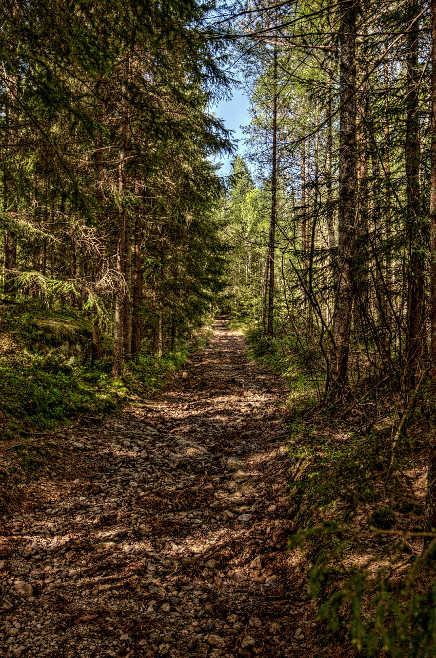 Batteriveien som knytter sammen Vetaåsbatteriet, Gylleråsbatteriet og Høyåsbatteriet